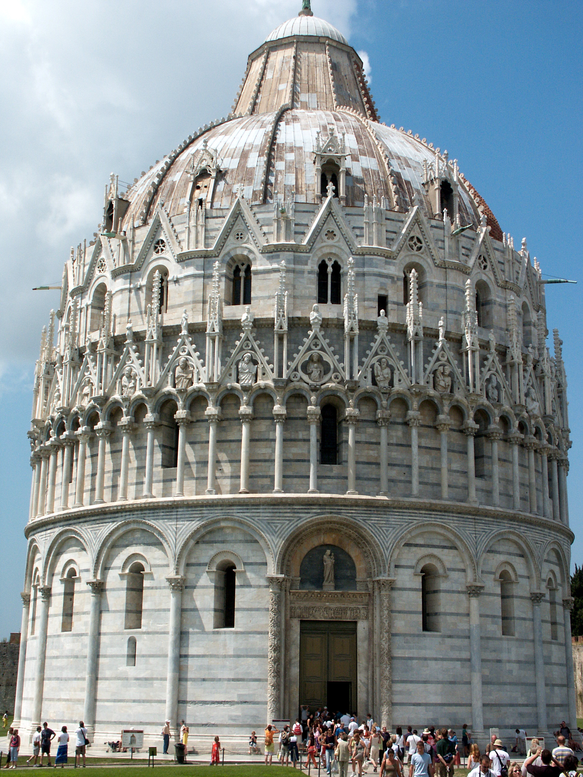 Baptistère de Pise